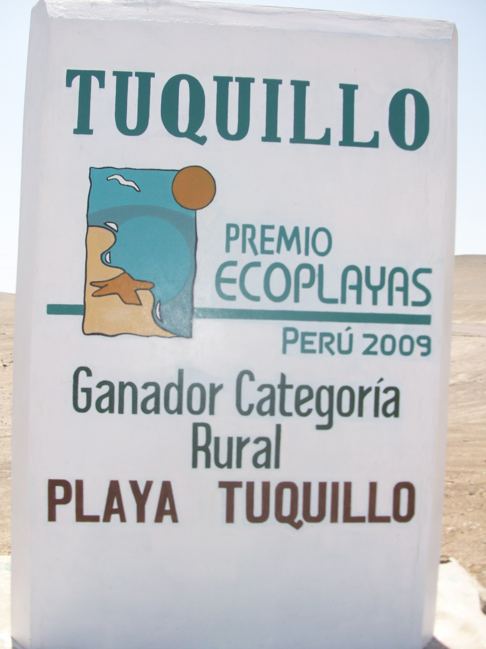 Premio Ecoplayas Perú 2009 al balneario de Tuquillo, ganador en la Categoría Rural (Huarmey, Ancash, Perú).